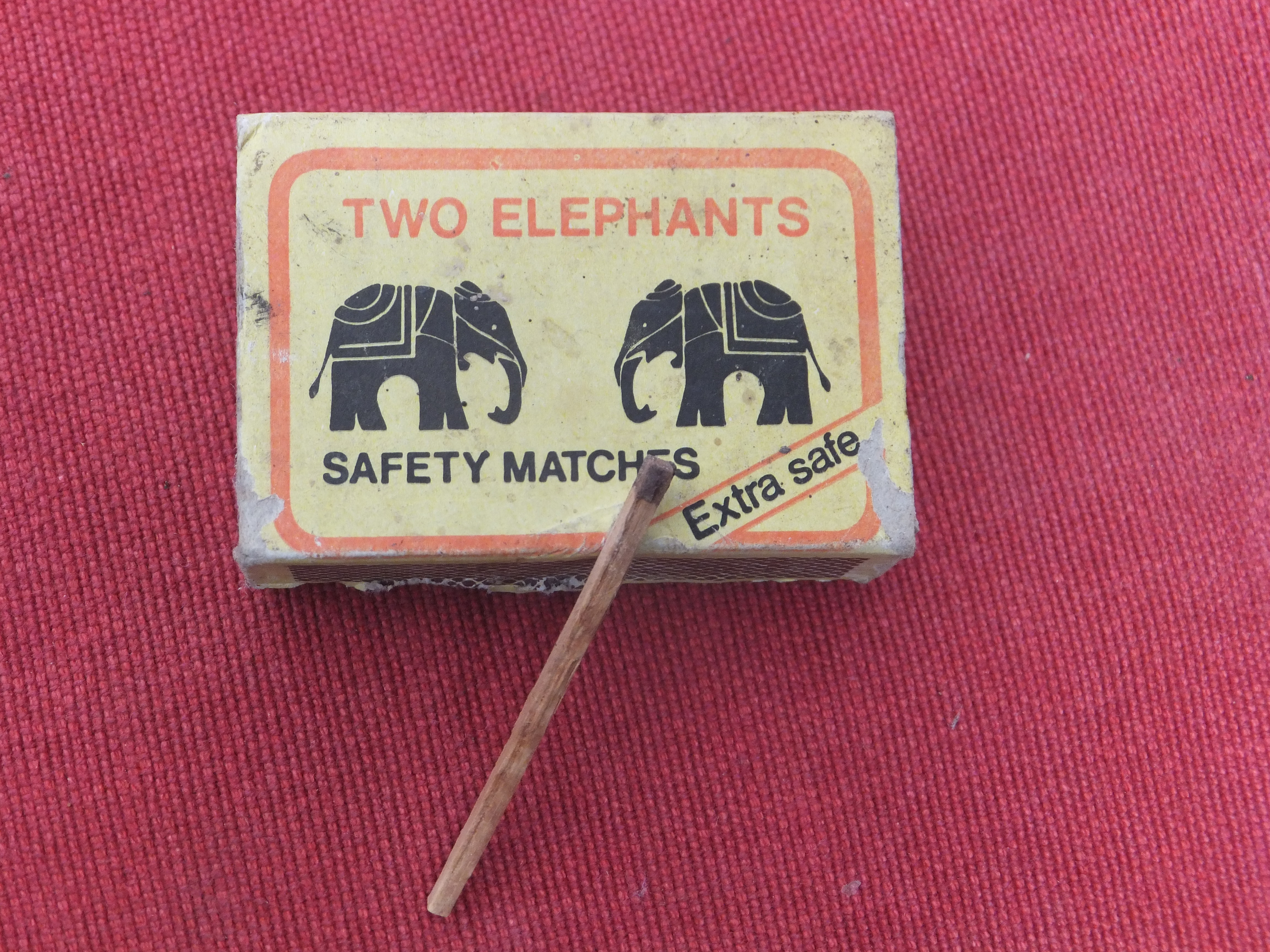 සිංහල: අලියා ගිණිපෙට්ටියක්